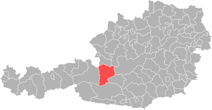 Bezirk St._Johann_im_Pongau in Österreich